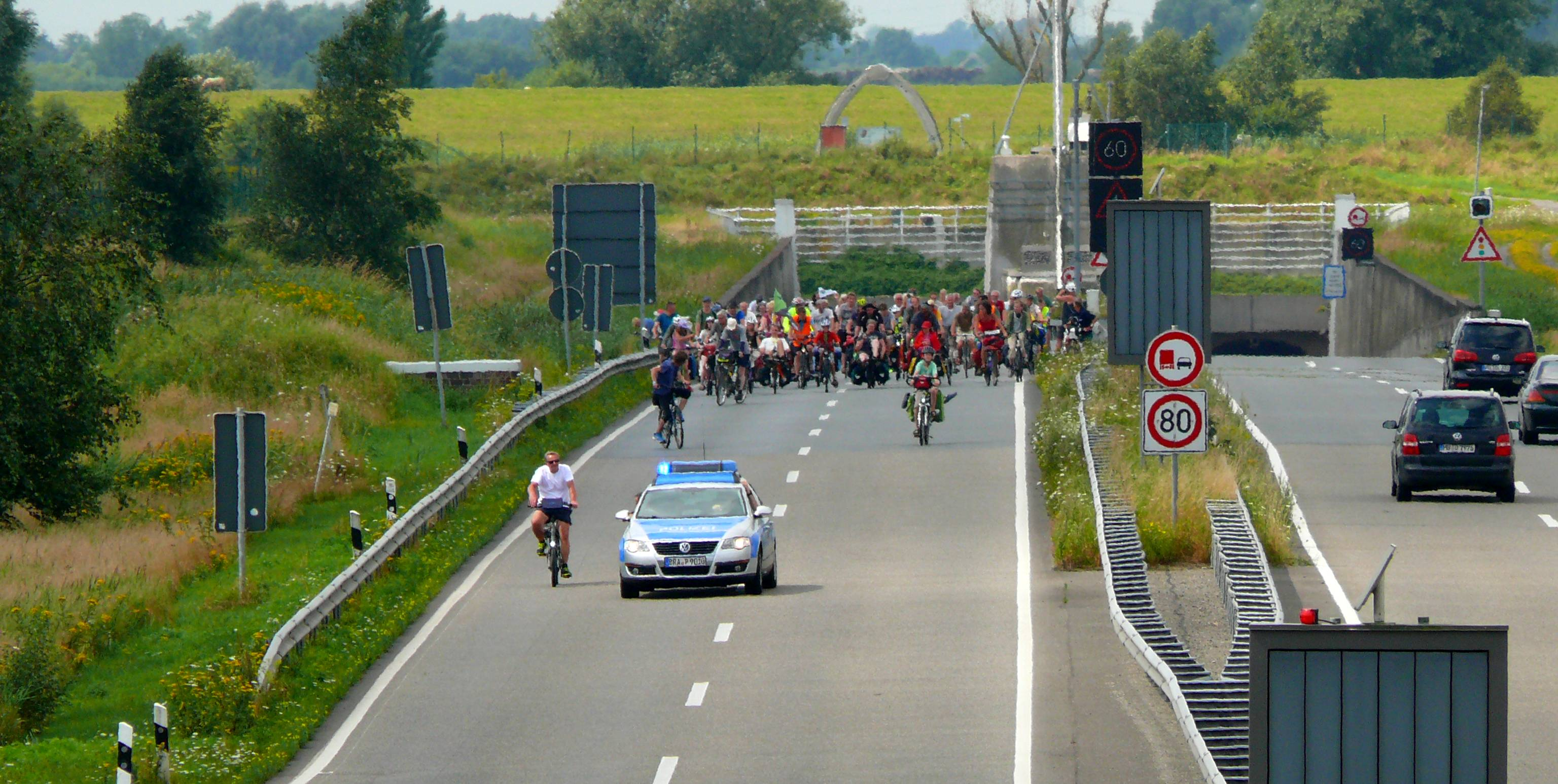 Fahrt der Fahrradfahrer und -fahrerinnen der Öko-Demo Tour de Natur durch den sonst nicht von Radlern befahrbaren Wesertunnel, einer Querung des Flusses Weser bei Dedesdorf. Eine Brücke existiert hier nicht, die früher vorhandene Fähre wurde eingestellt.